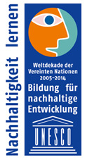 Logo der UN-Dekade 2005-2014